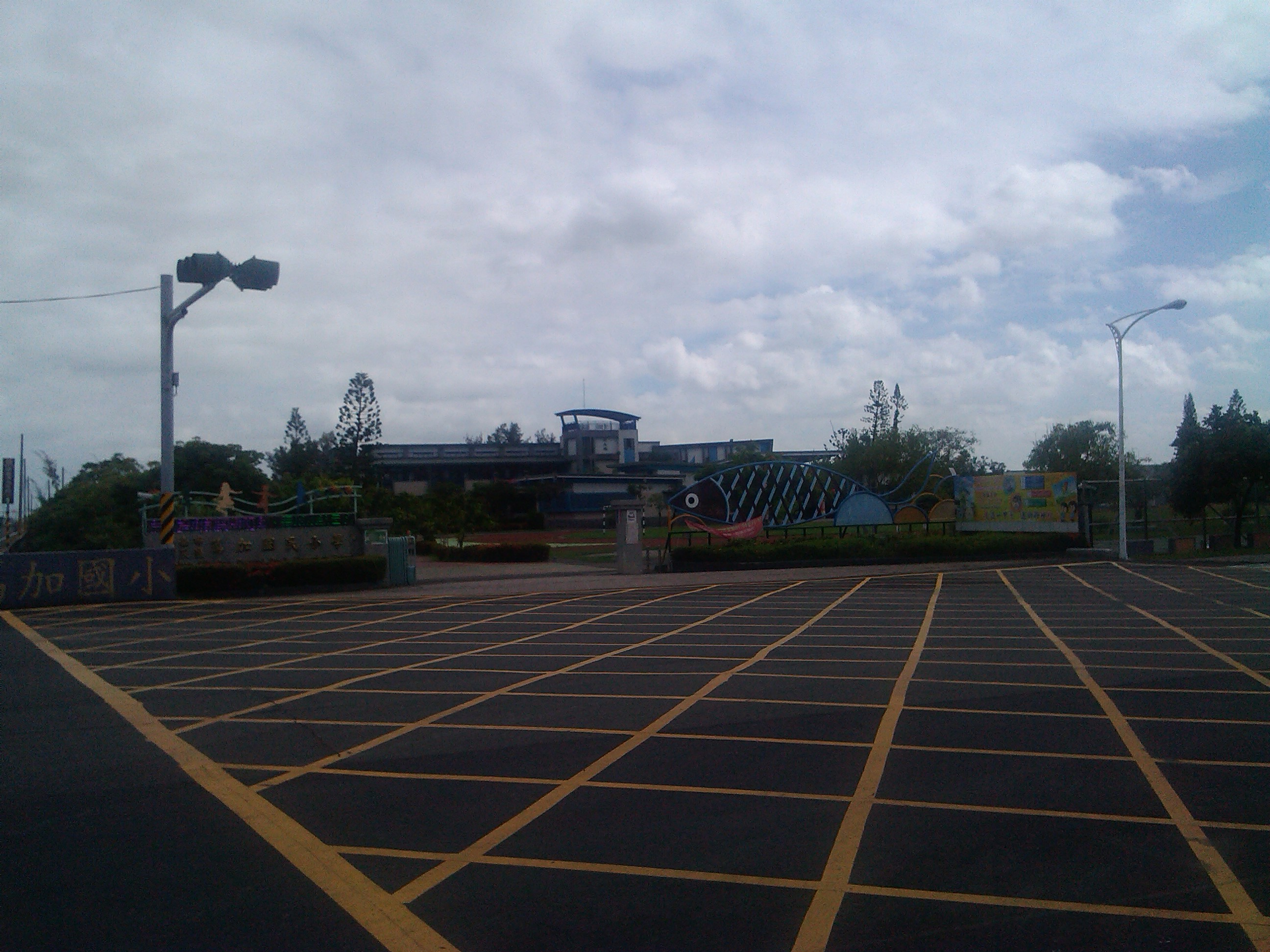 位於台17線及南32鄉道口